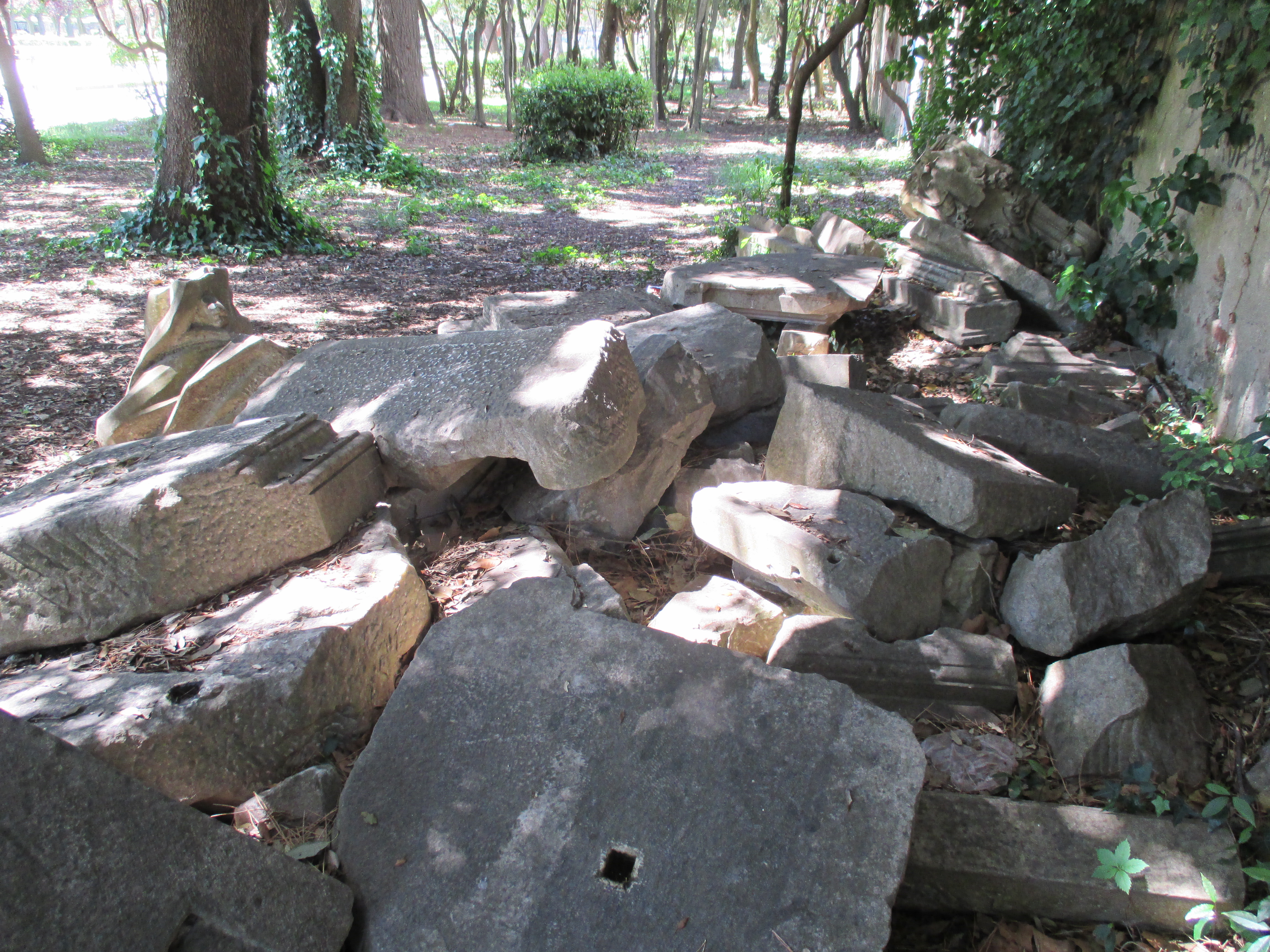 Livorno, parco di villa Fabbricotti: resti provenienti dalla chiesa armena, depositati nell'area della villa dopo la distruzione della chiesa. In passato solo una piccola parte dei marmi è stata collocata nel portico della chiesa (unica parte sopravvissuta del monumentale edificio).